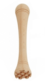 Muddlare för t.ex. krossning/blandning av ingredienser till drinkar. Egen bearbetning/foto. GFDL